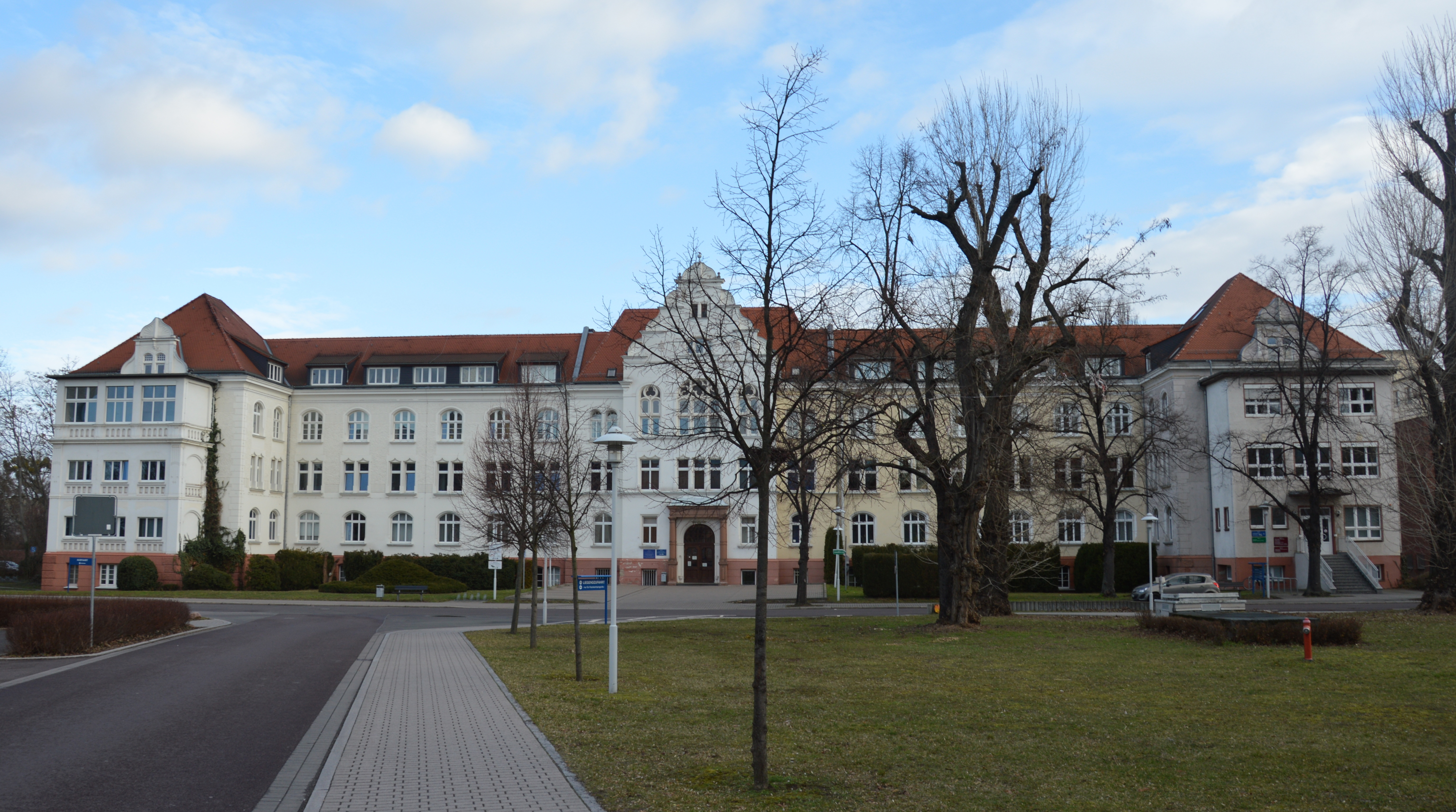 Uniklinikum Magdeburg Gebäude 14